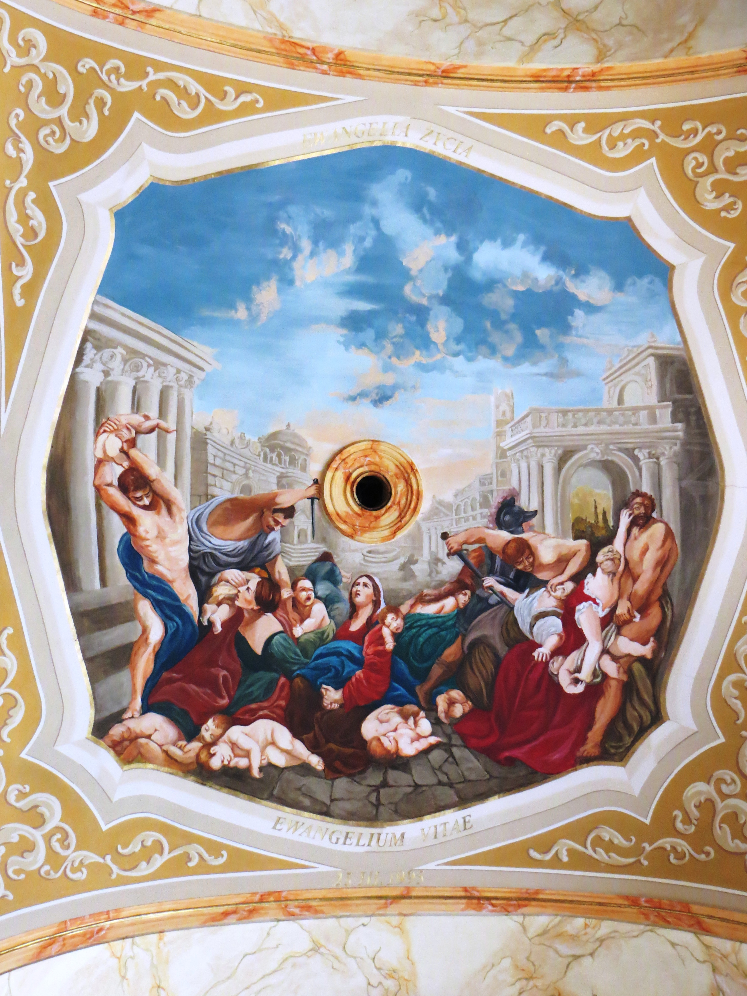 Malowidła na suficie w bazylice ONMP w Wadowicach.